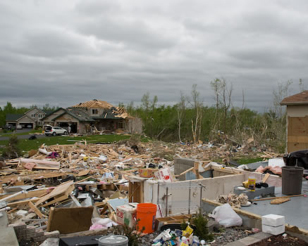 Tornado damage in Hugo, Minnesota